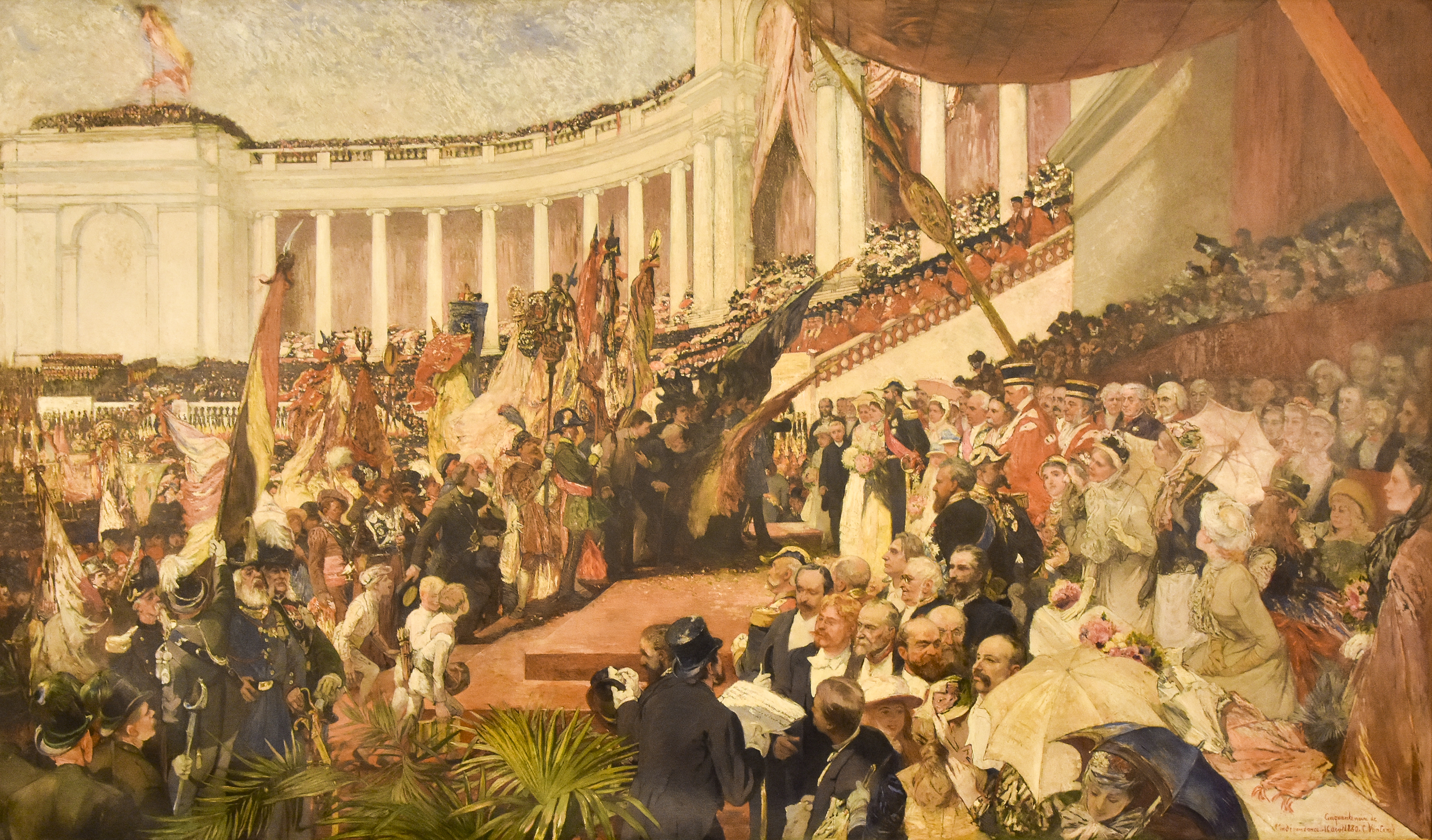 Camille van Camp (1834-1891) Vijftigste verjaardag der Belgische onafhankelijkheid - Parlement Brussel 21-07-2018